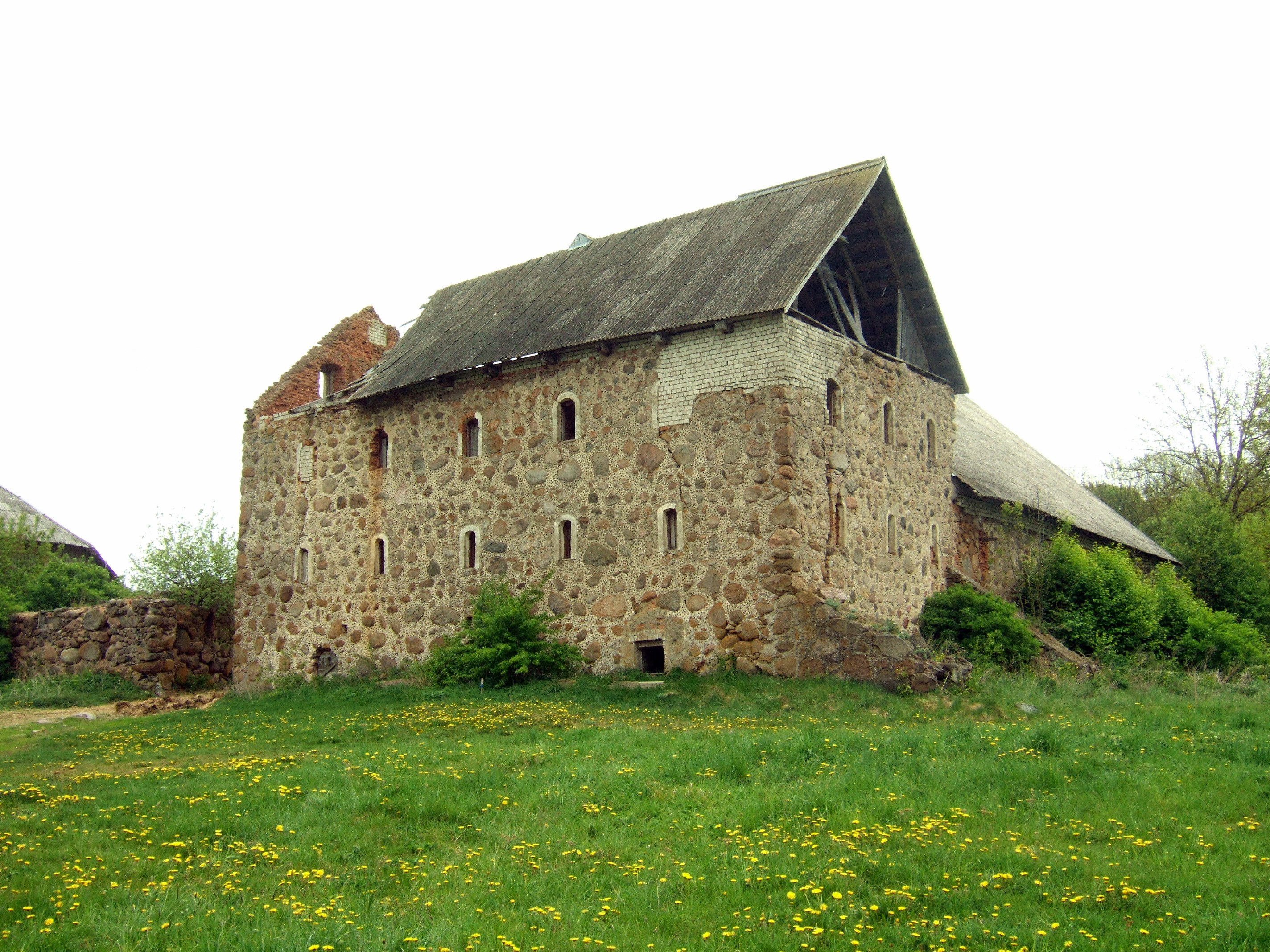 Gornostajiškių dvaro sodybos grūdų sandėlis